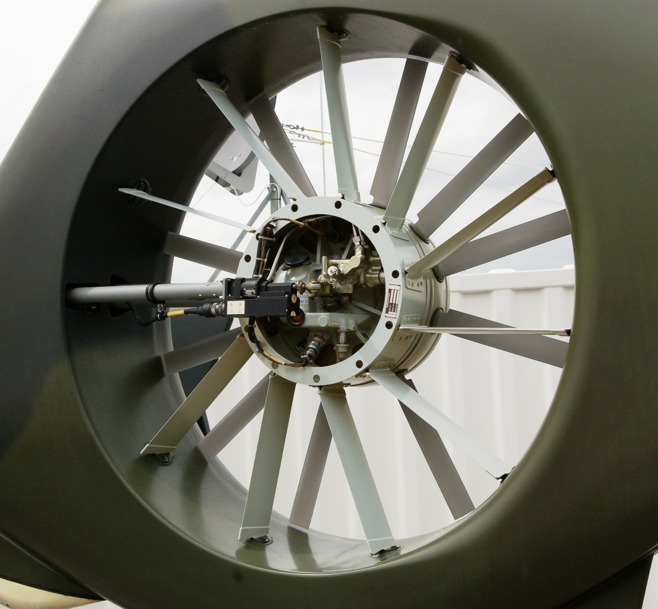 Fenestron mit Verstellmechanik an einem EC-135.